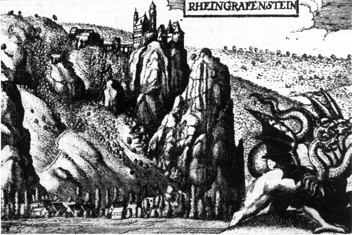 Burg Rheingrafenstein, Kupferstich